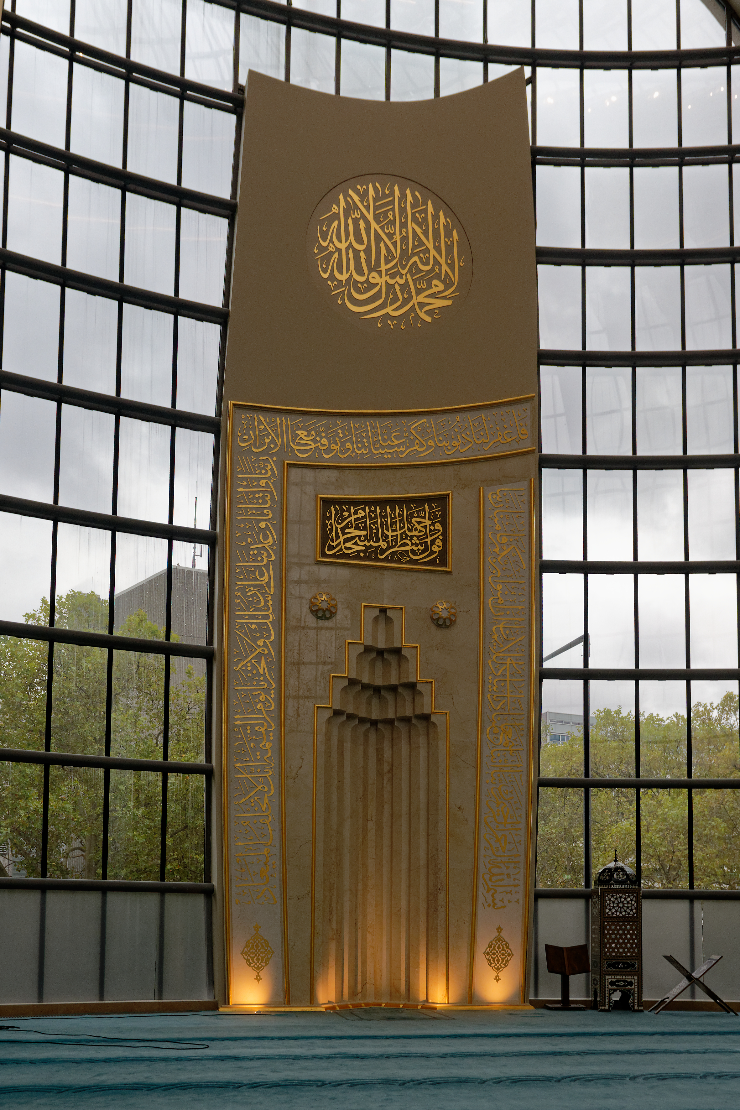 DITIB-Zentralmoschee Köln Tag der offenen Moschee 2019 Gebetsnische